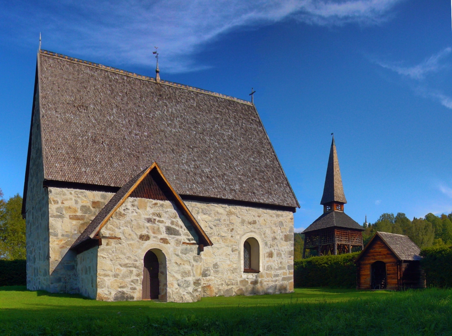 Lidens gamla kyrka med klockstapel och stegport